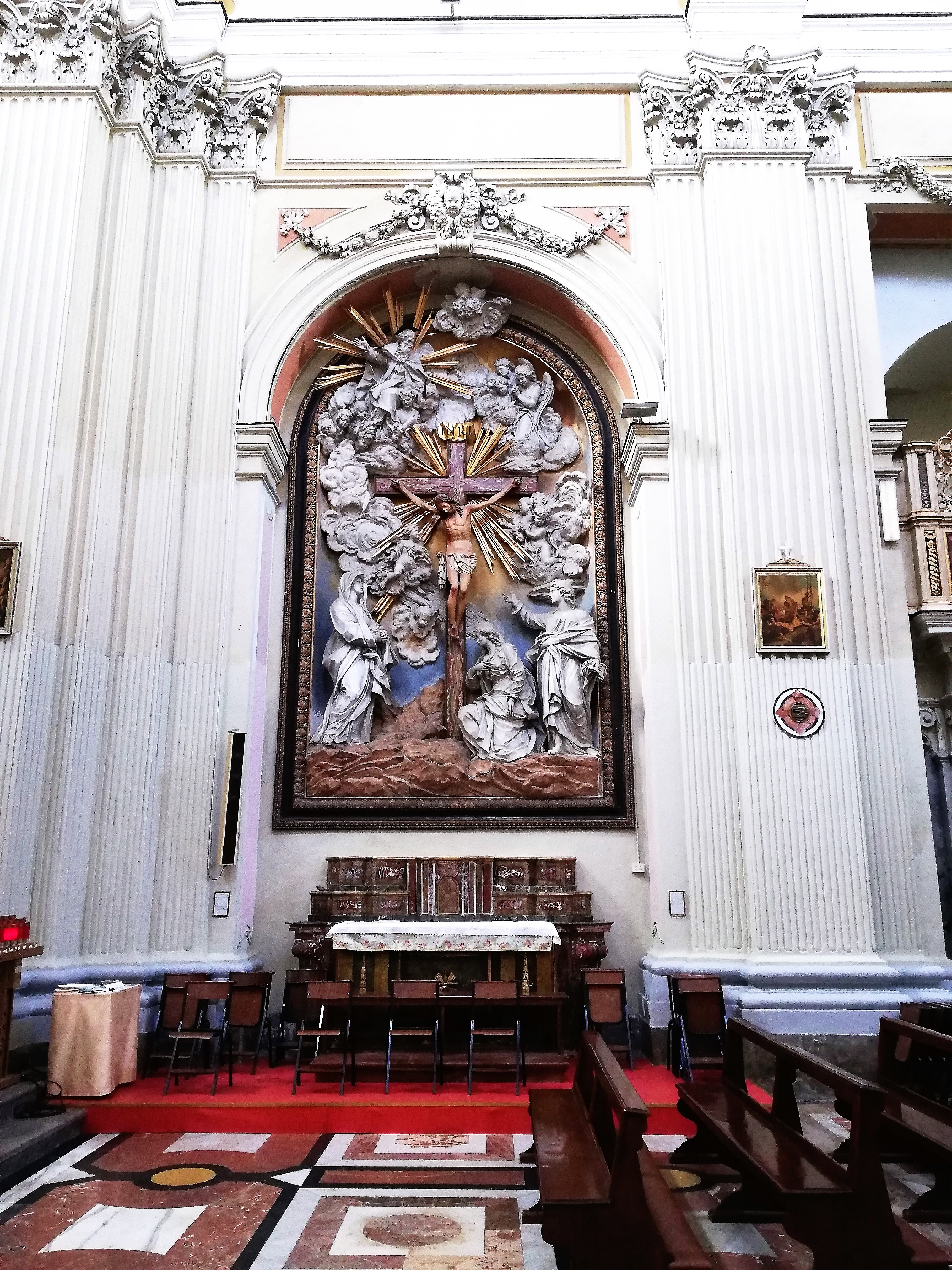 Altare laterale destro. Cappella del Santissimo Crocifisso. Statue marmoree opere di Ignazio Marabitti.